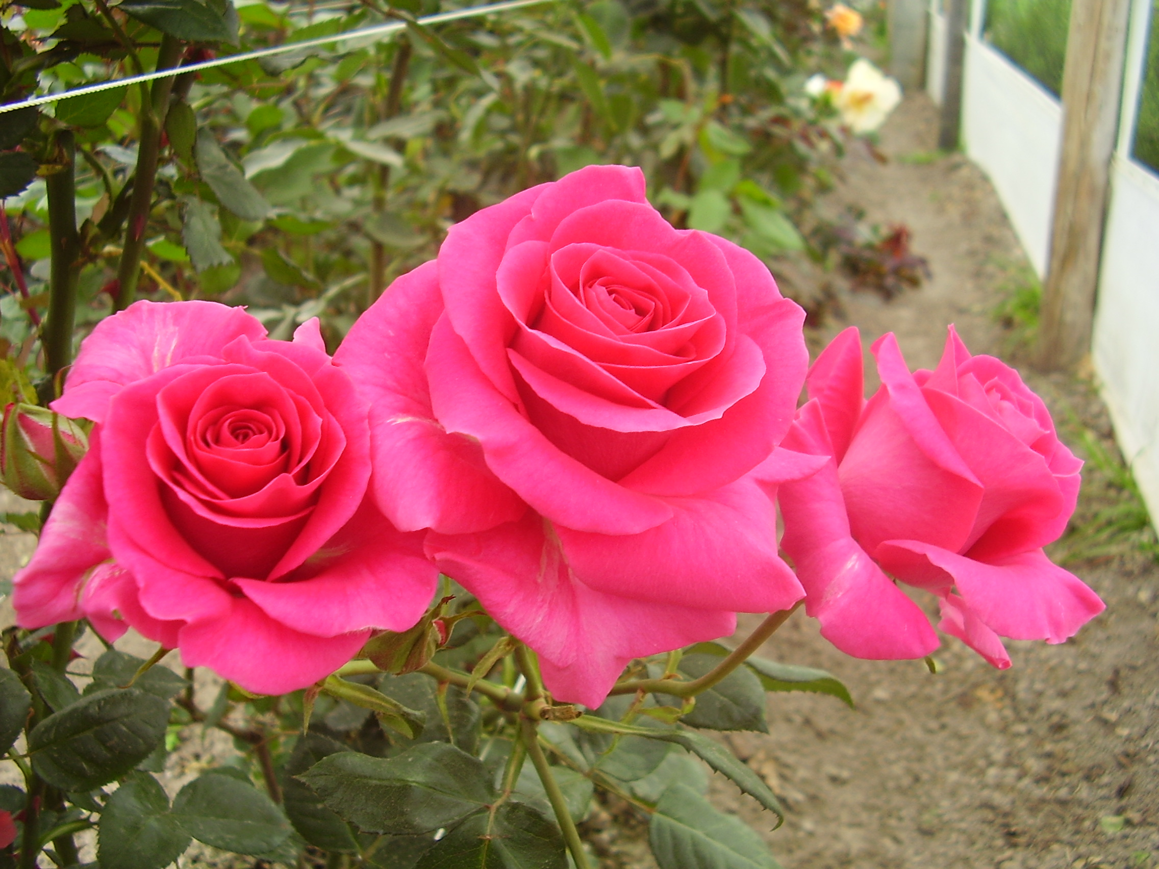 Rosa Rosada